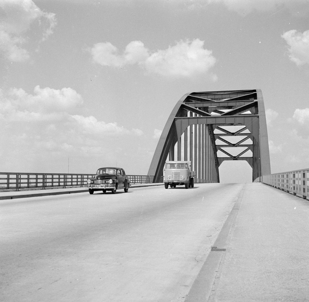 Nationaal Archief Beschrijving: Auto en kleine vrachtwagen op de Viaanse brug (oude verkeersbrug) Datum: juni 1952 Bestanddeelnummer 252-0141 Vervaardiger: Poll, Willem van de URL: Voor meer informatie over het Nationaal Archief: Voor meer foto's uit deze en andere collecties, bezoek onze Beeldbank, U kunt ons helpen onze kennis van de fotocollecties te verrijken door tags en commentaren toe te voegen. Herkent u mensen of locaties of heeft u een bijzonder verhaal te vertellen bij één van de foto's, laat dan een reactie achter (als u ingelogd bent bij Flickr) of stuur een mailtje naar